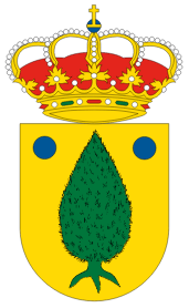 Escudo de La Ginebrosa.